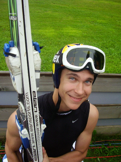 Arttu Lappi während des Team Wettkampfes beim 4 Nations Tournament in Hinterzarten am 26.7.2008